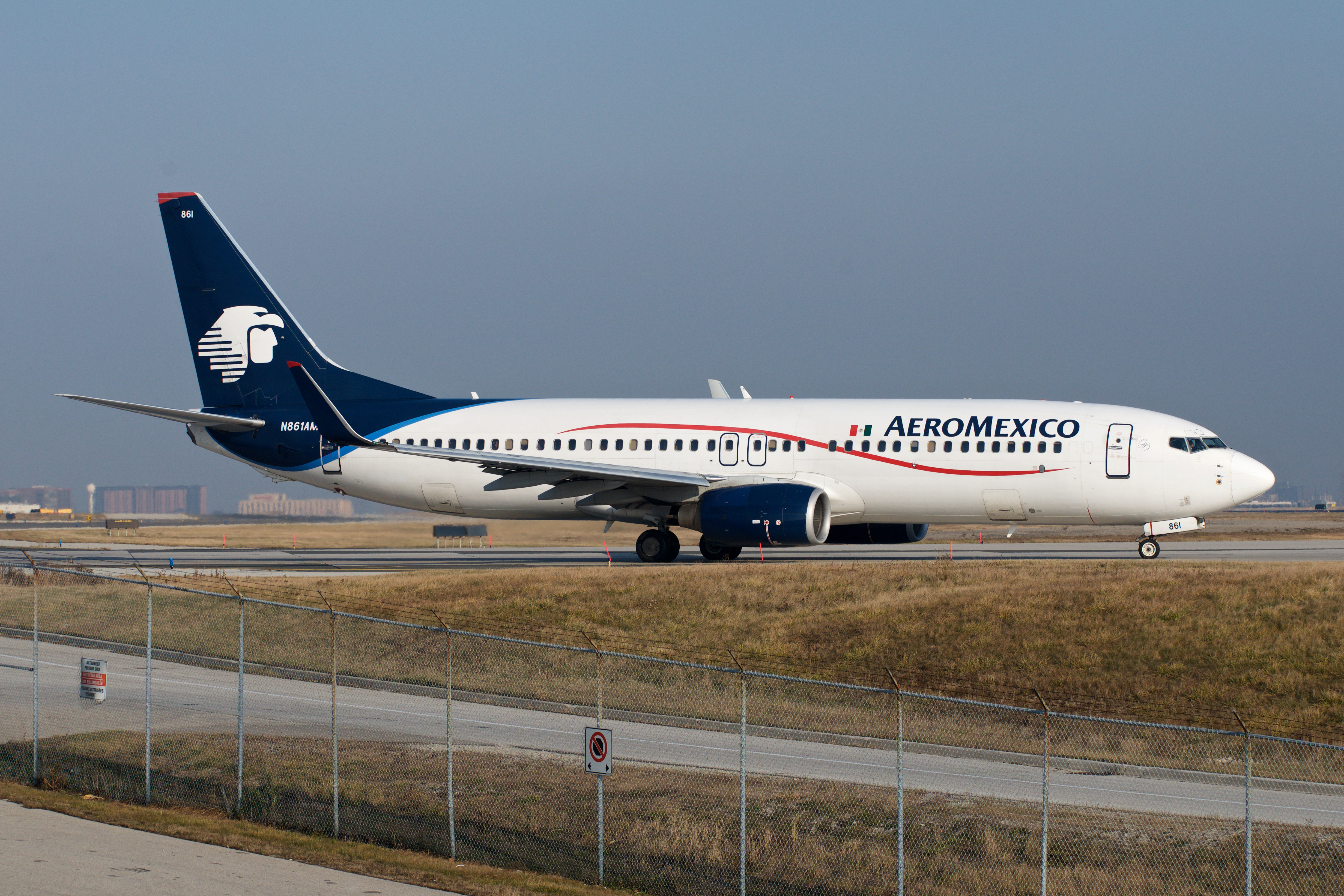 Departing YYZ. 🇲🇽